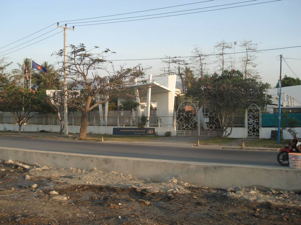 Embaixada da Malasia, Dili